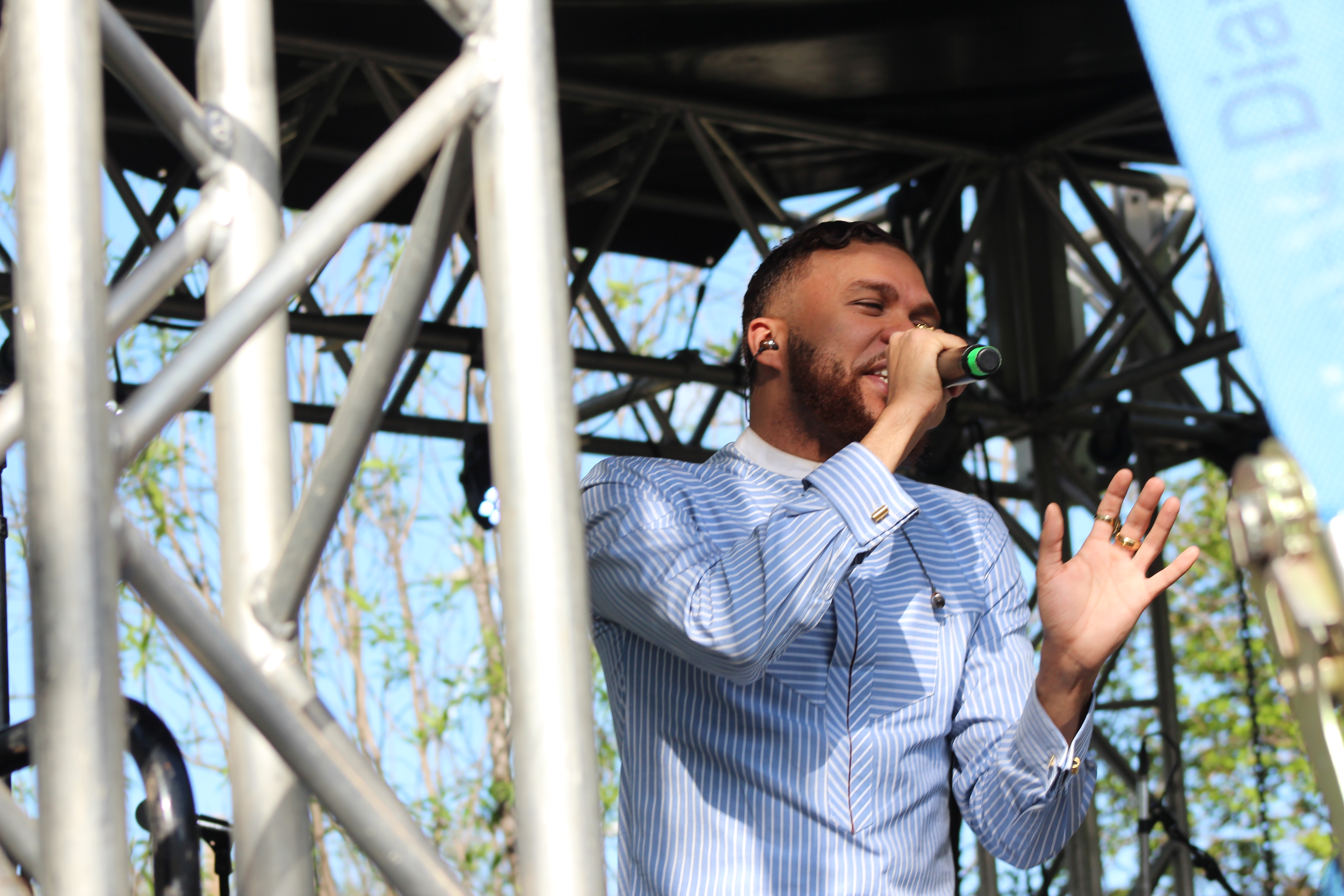 Jidenna